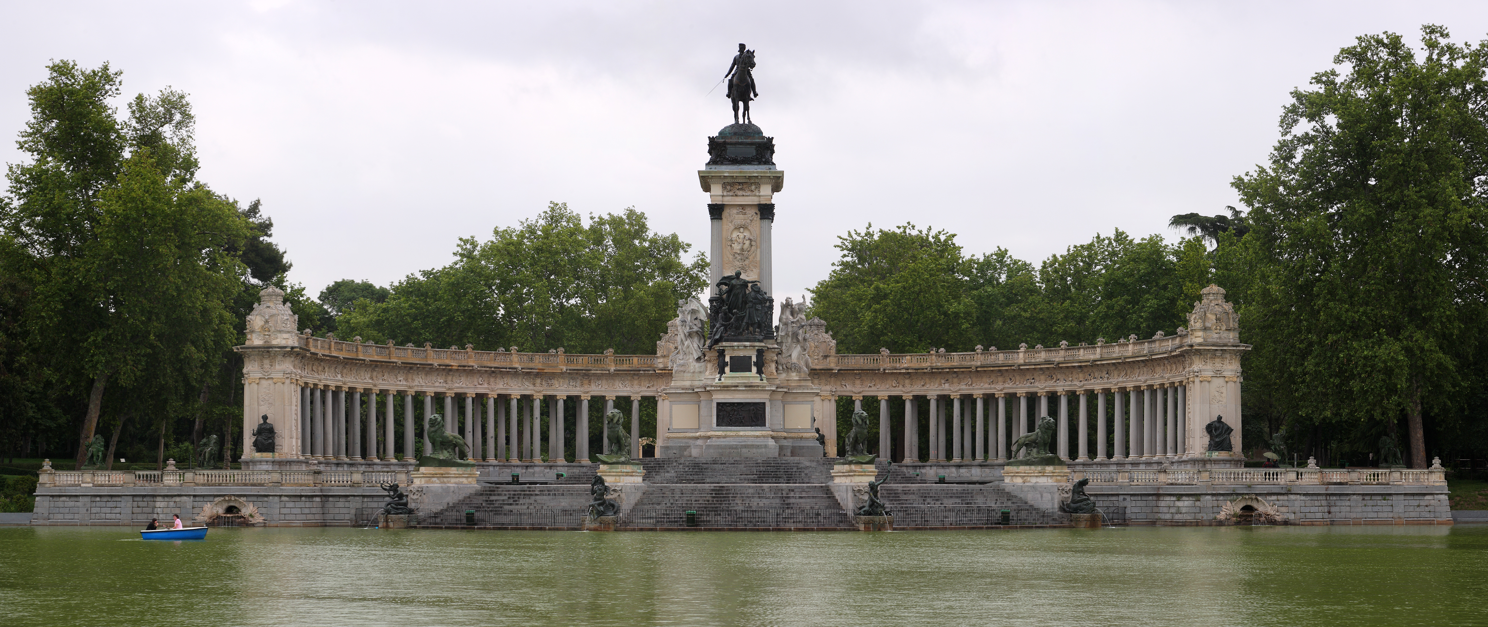 Alfonso XII Mausoleum, in the Parque del Buen Retiro, Madrid, Spain